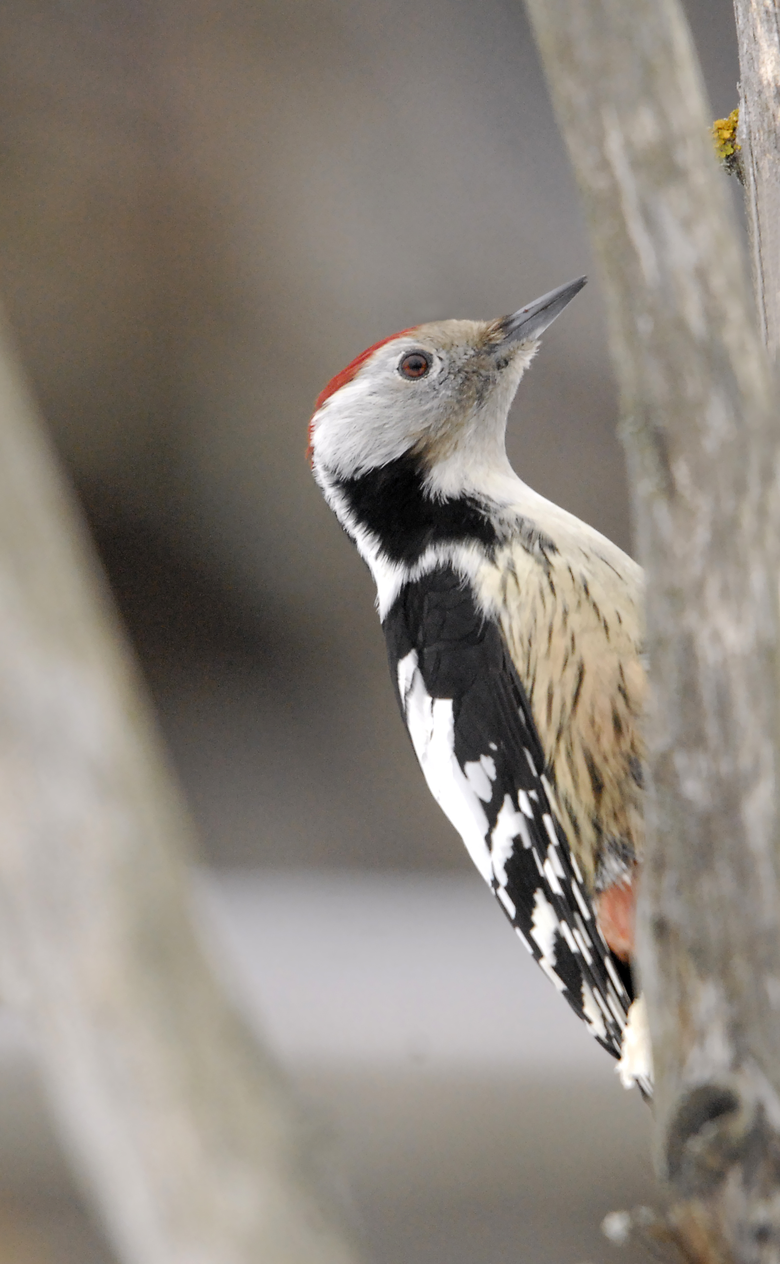 Tamme-kirjurähn Dendrocopos medius on Eestis III kategooria kaitsealune liik. Elab Eestis aastaringselt. Pilt on tehtud Viljandimaal.